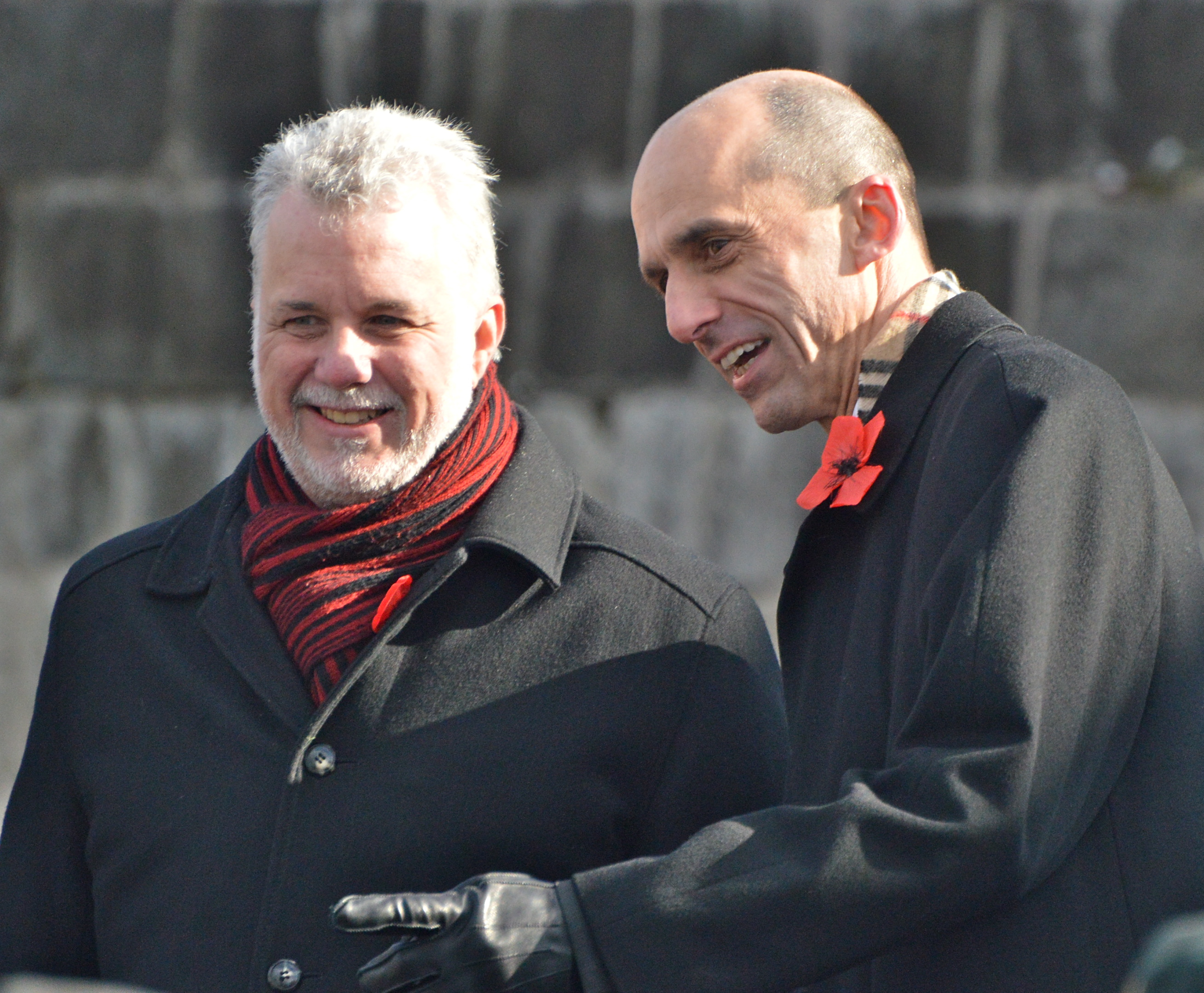 Philippe Couillard et Steven Blaney, à Québec, lors de la cérémonie du Jour du souvenir 2014